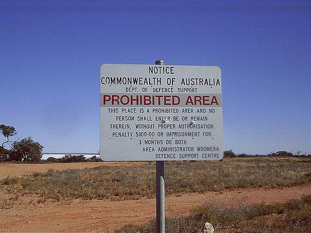 Panneau d'interdiction d'entrer dans la zone